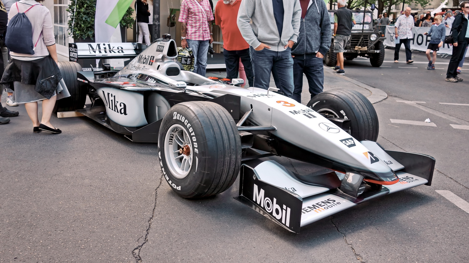 McLaren MP4/14